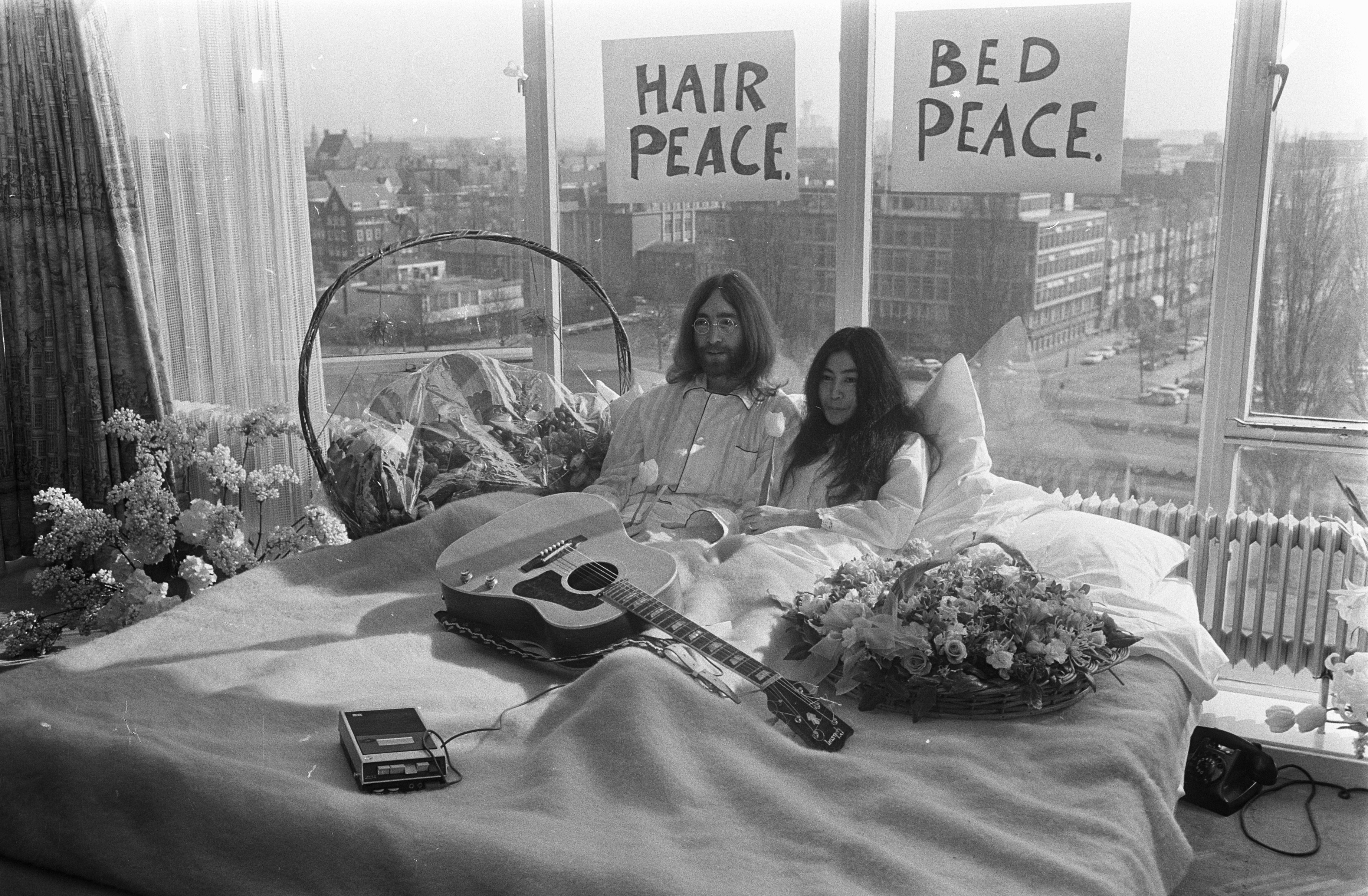 Collectie / Archief : Fotocollectie Anefo Reportage / Serie : [ onbekend ] Beschrijving : John Lennon en zijn echtgenote Yoko Ono op huwelijksreis in Amsterdam. John Lennon en Yoko Ono in bed in het Hilton Hotel Datum : 25 maart 1969 Locatie : Amsterdam, Noord-Holland Trefwoorden : hotels, huwelijksreizen, musici, muziek, zangers Persoonsnaam : Lennon, John, Ono Yoko, Ono, Yoko Instellingsnaam : Hilton Hotel Fotograaf : Koch, Eric / Anefo Auteursrechthebbende : Nationaal Archief Materiaalsoort : Negatief (zwart/wit) Nummer archiefinventaris : bekijk toegang 2.24.01.05 Bestanddeelnummer : 922-2302